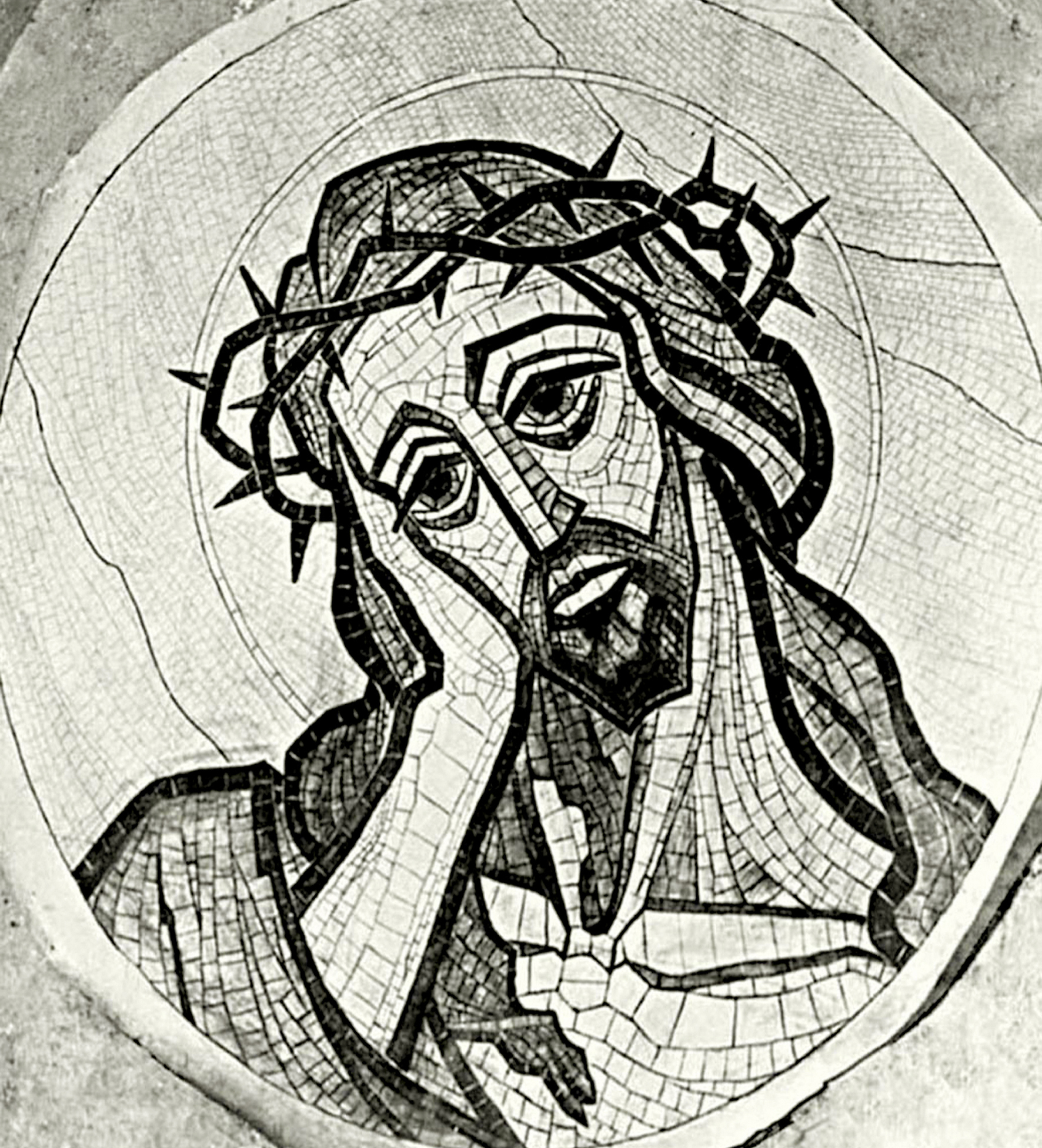 A Matuliauskas vyresnysis mozaikos Rupintojelis kartonas 1958